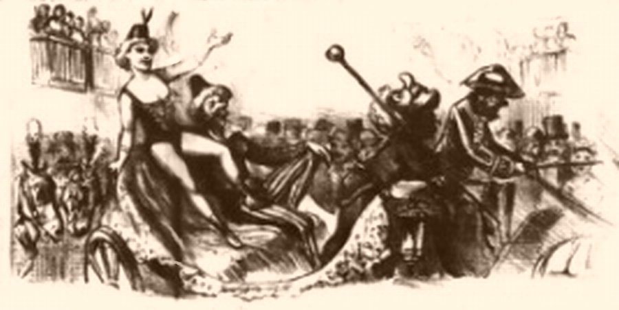 Desenho de Angelo Agostini, Carnaval, in:Revista Ilustrada 1884